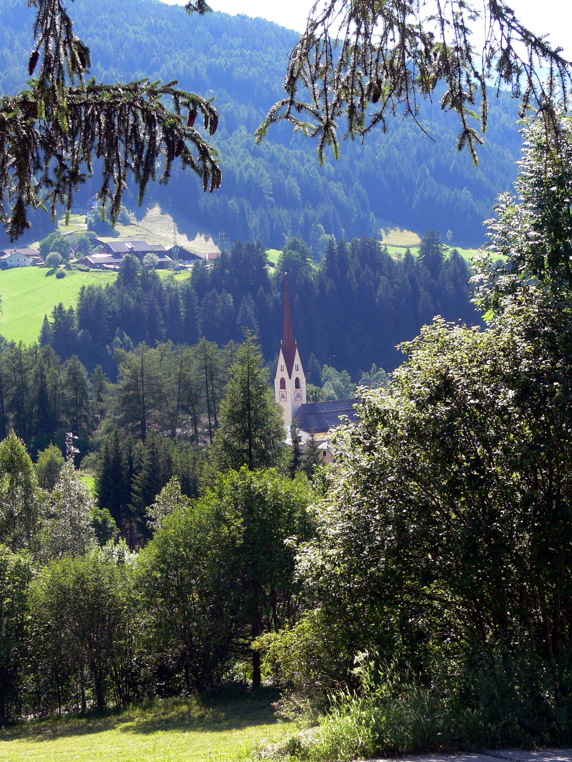 Welsberg im Pustertal. Blick zur Kirche im Tal